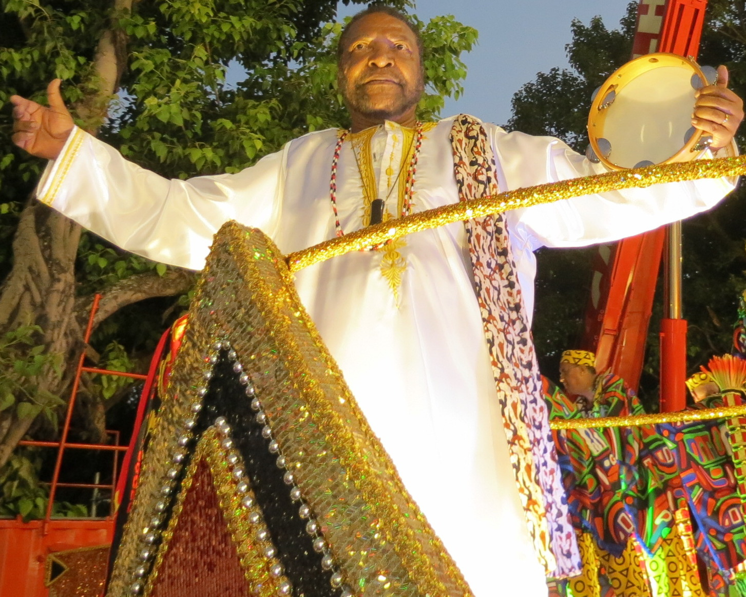 Unidos de Vila Isabel - Rio Carnaval 2012 65